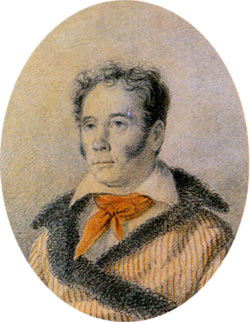 ПОРТРЕТ НЕИЗВЕСТНО КОГО Портрет Ивана Ивановича Козлова (1823-27 гг.) работы О. А. Кипренского Источник: ??? Гнедич Н.И. Художник Карл Гампельн [1]